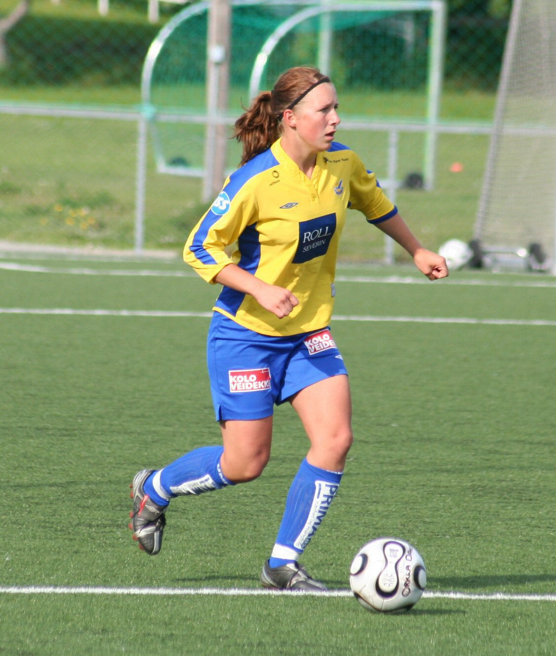 Fotballspilleren Lene Bredesen